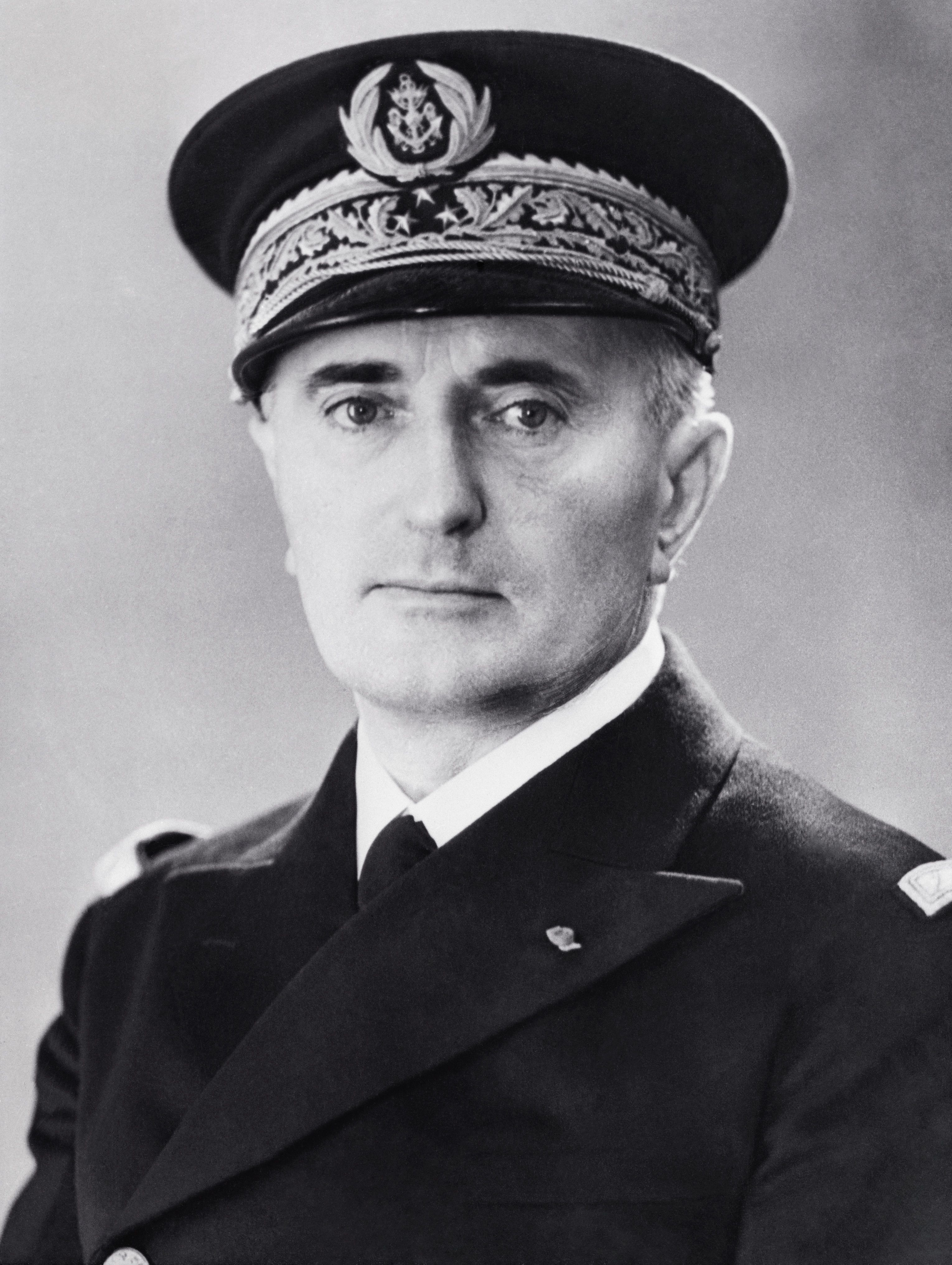 François Darlan, sans date.